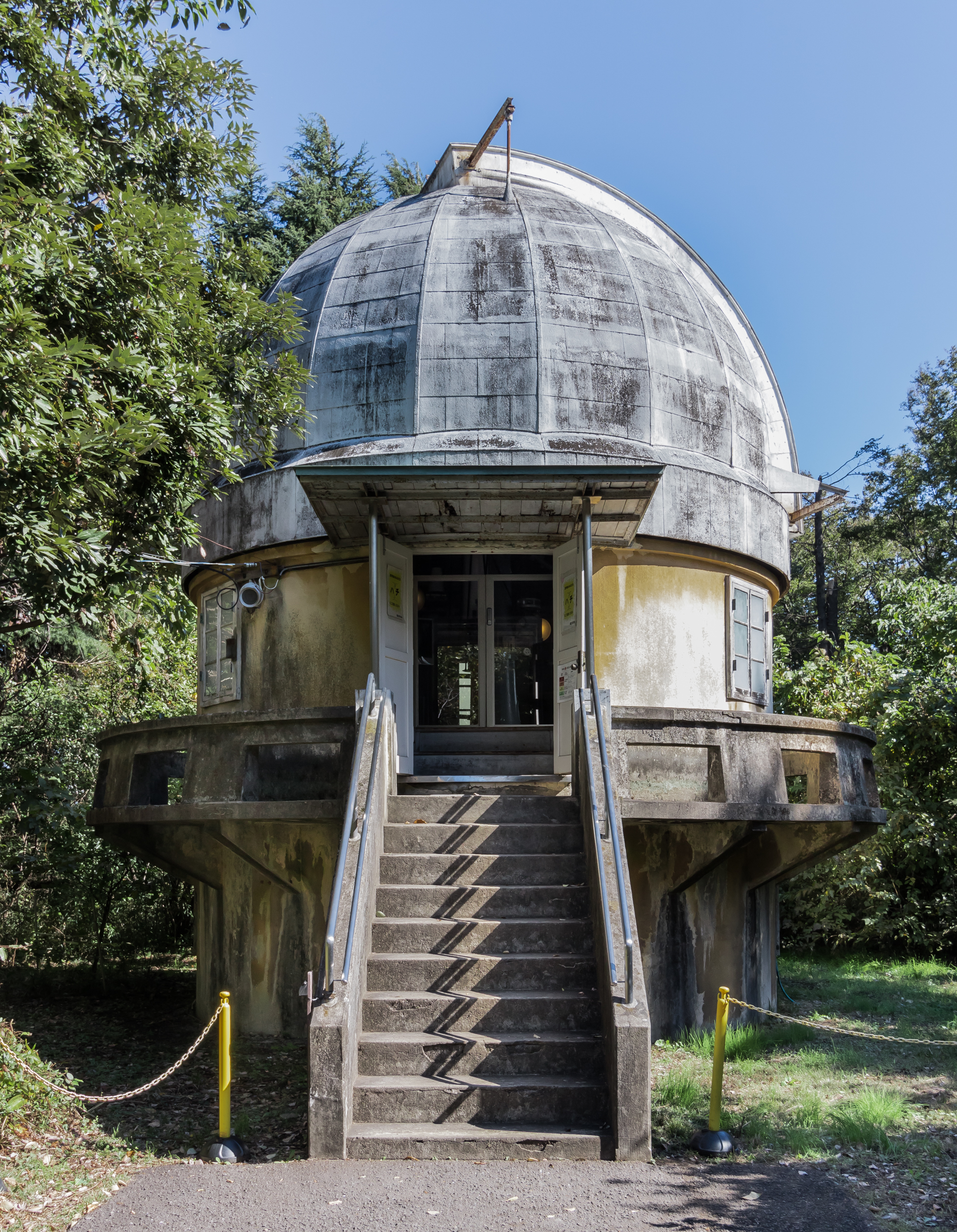 国立天文台、三鷹キャンパス。第一赤道儀室（日本国登録有形文化財）